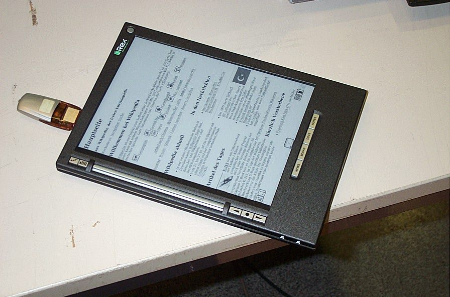 Frage eines Standbesuchers "Läuft Wikipedia auf meinem E-Paper?" - mangels Internetanbindung hier statischer Test vom USB-Stick